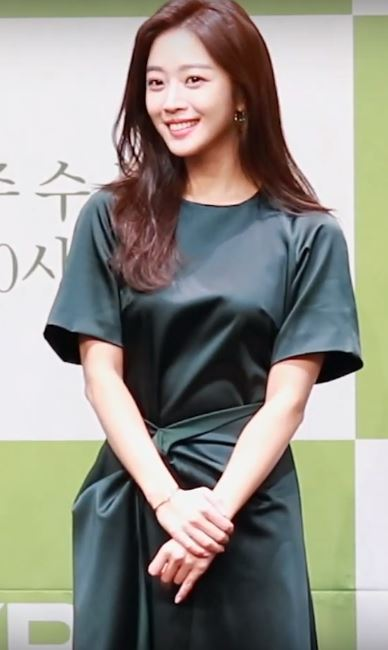 29일 오후 서울시 구로구 신도림동 라마다 서울 신도림에서 KBS 새 수목드라마 ‘포레스트’의 제작발표회가 열려 배우 박해진, 조보아가 참석해 포토타임을 갖고 있다